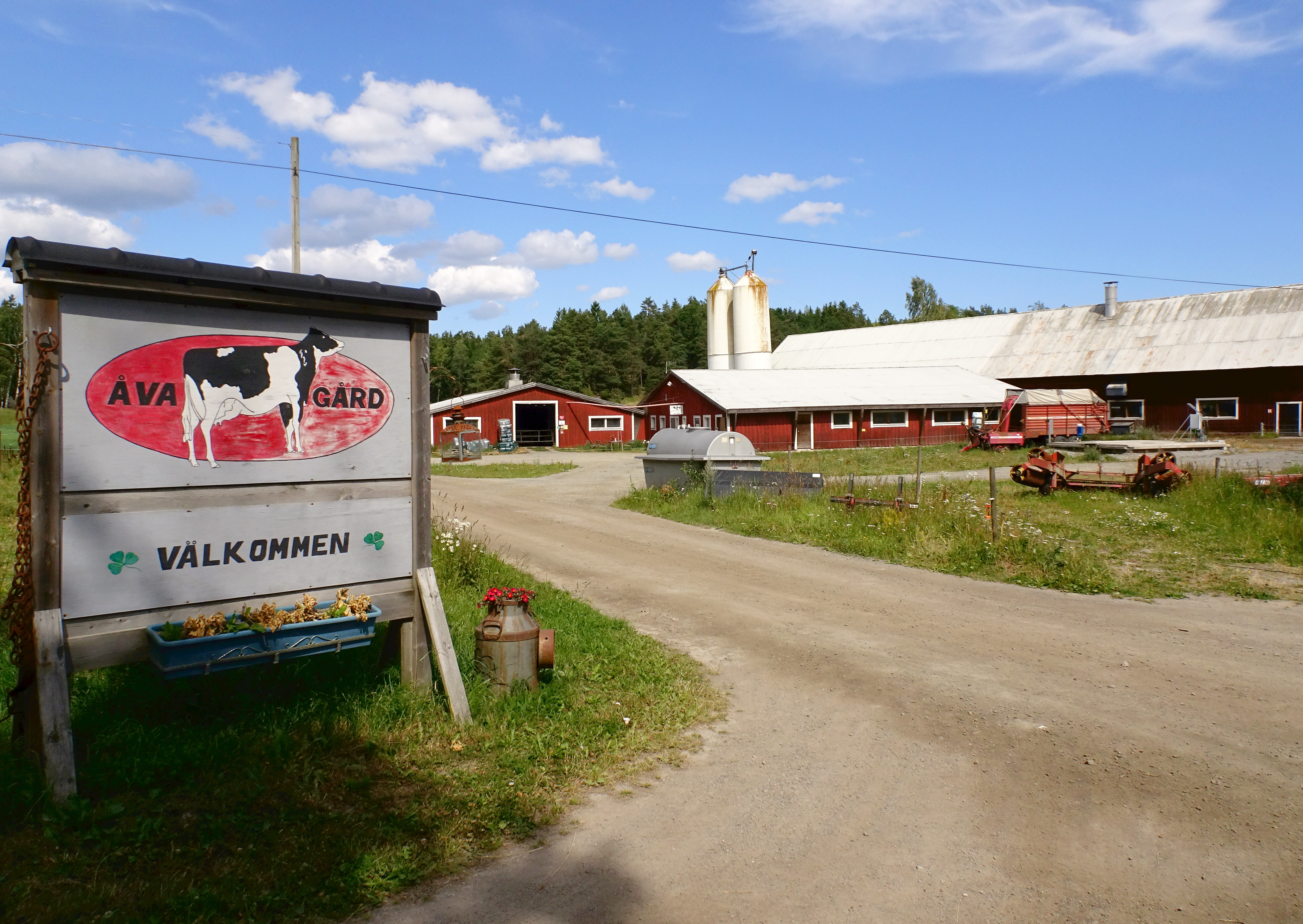 Åva gård